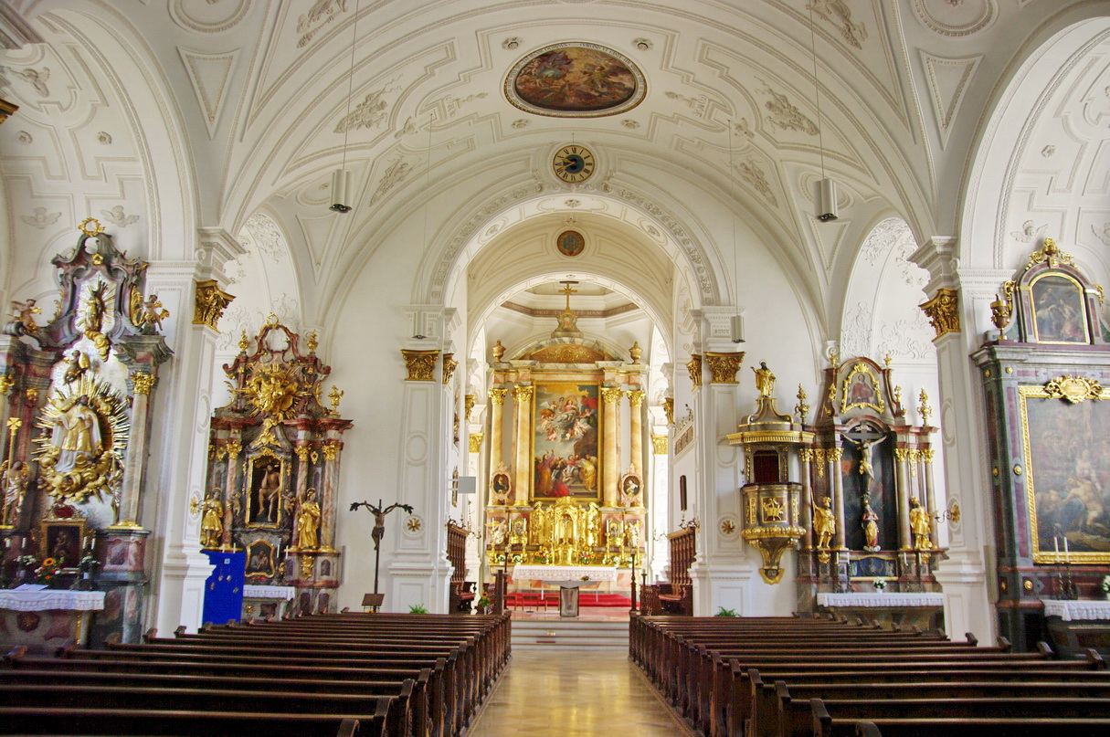 Kirche Mariä Himmelfahrt, Marienplatz in Weilheim